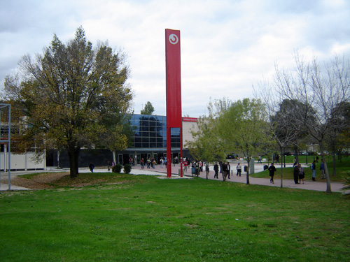 Estación de Cantoblanco-Universidad de Cercanías RENFE. Foto hecha el 6 de noviembre de 2006 desde la rampa de acceso a la Biblioteca de Humanidades de la Universidad Autónoma de Madrid.